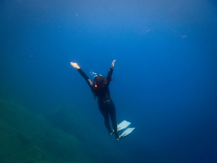 Remontée d'apnée à poids constants